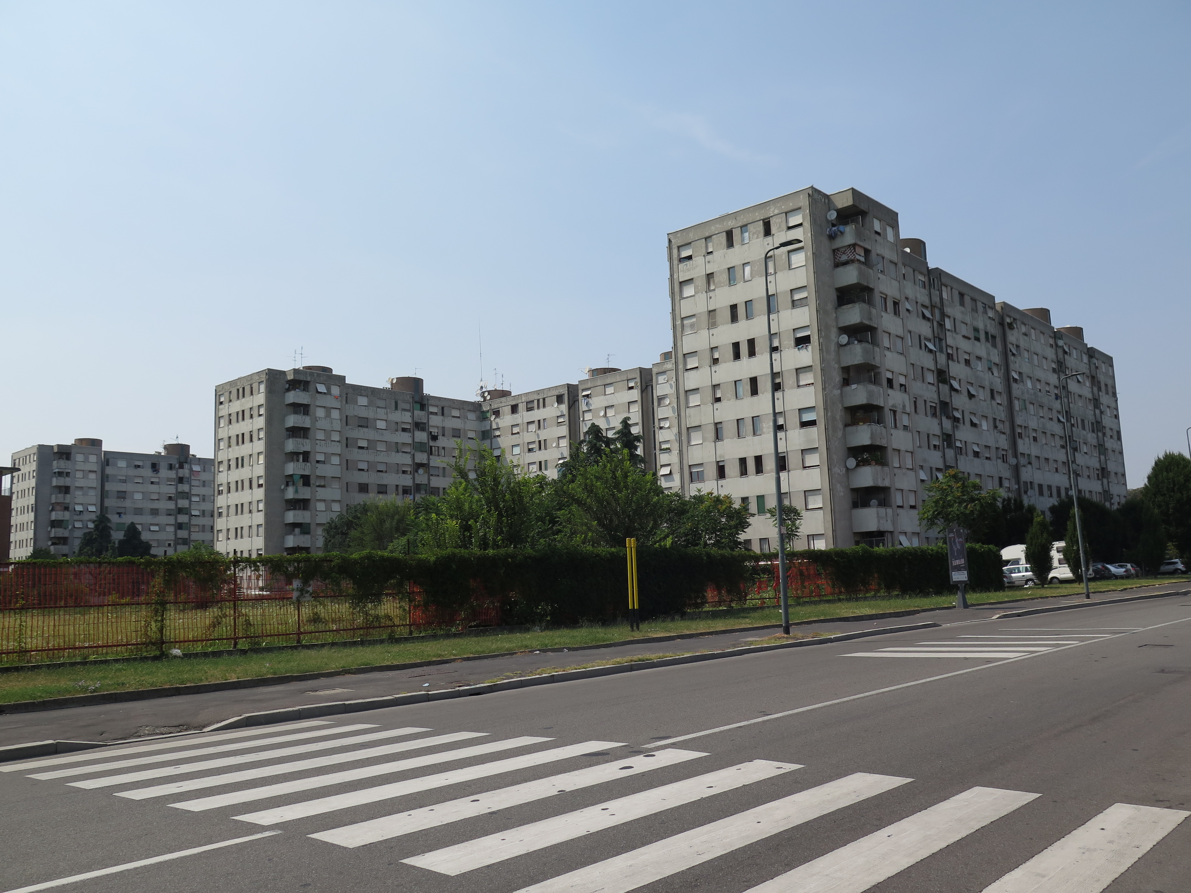 Stabili popolari in via Salomone a Milano